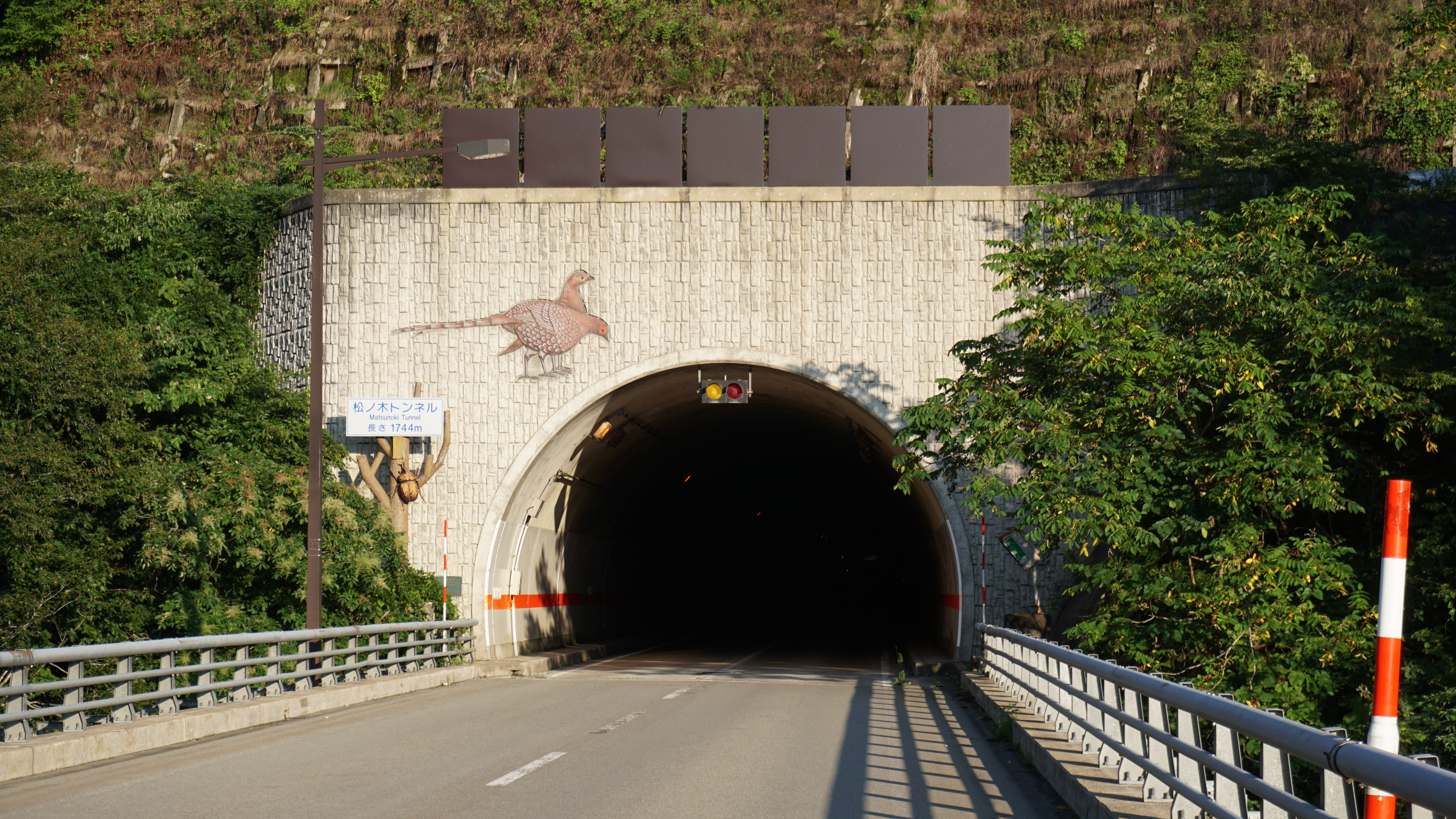 秋田県由利本荘市鳥海町と湯沢市との境界にある松ノ木峠を抜ける松ノ木トンネル。湯沢市方面へ向けて登りの片勾配となっている。由利本荘市側より撮影。